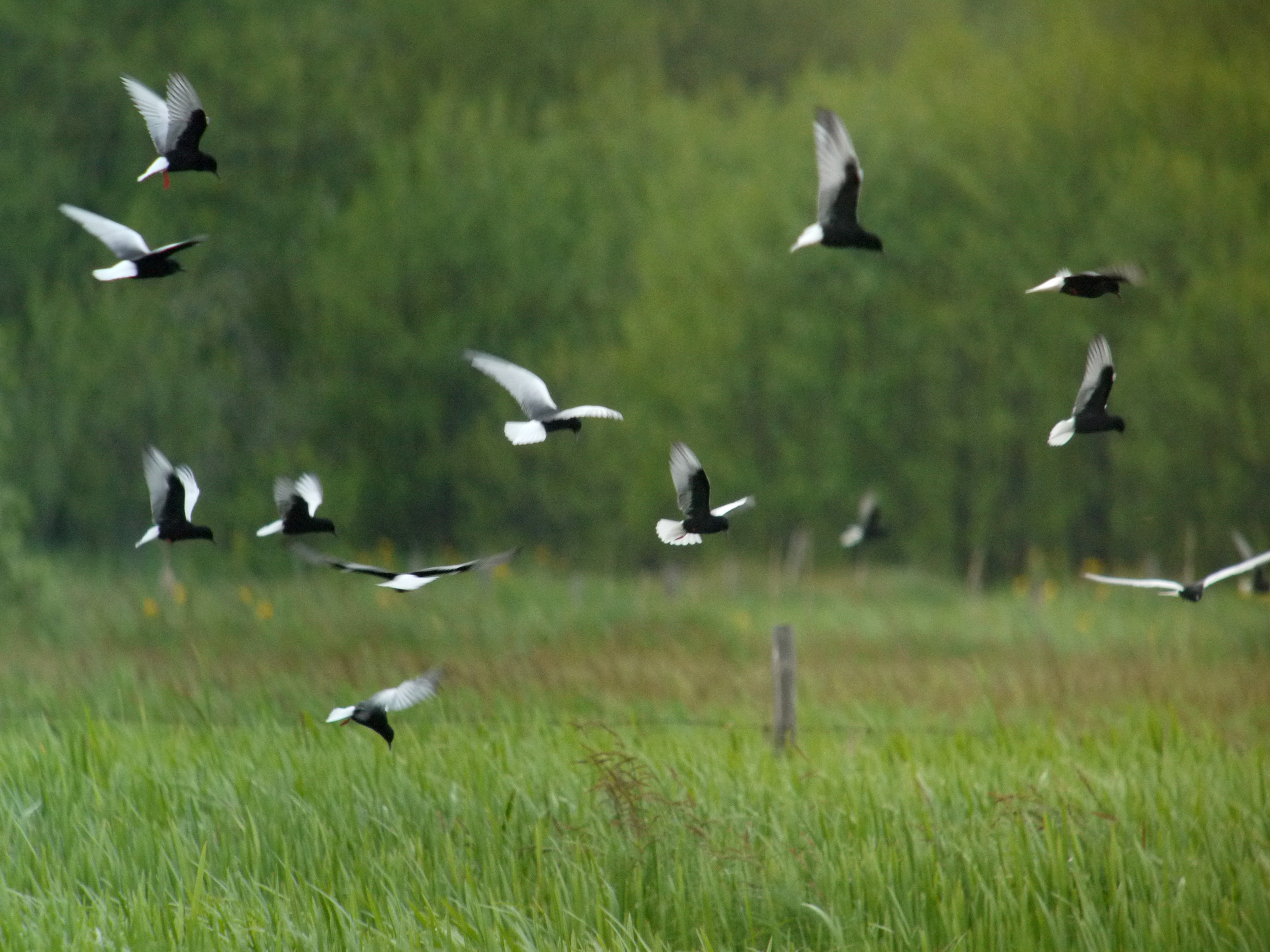 Chlidonias leucopterus, Mścichy, Biebrzański Park Narodowy, Polska. Camera: Swarowski 80 HD 30 X, Panasonic DMC-GF1 + Lumix G 20mm F1.7 ASPH (Adapter DCB)